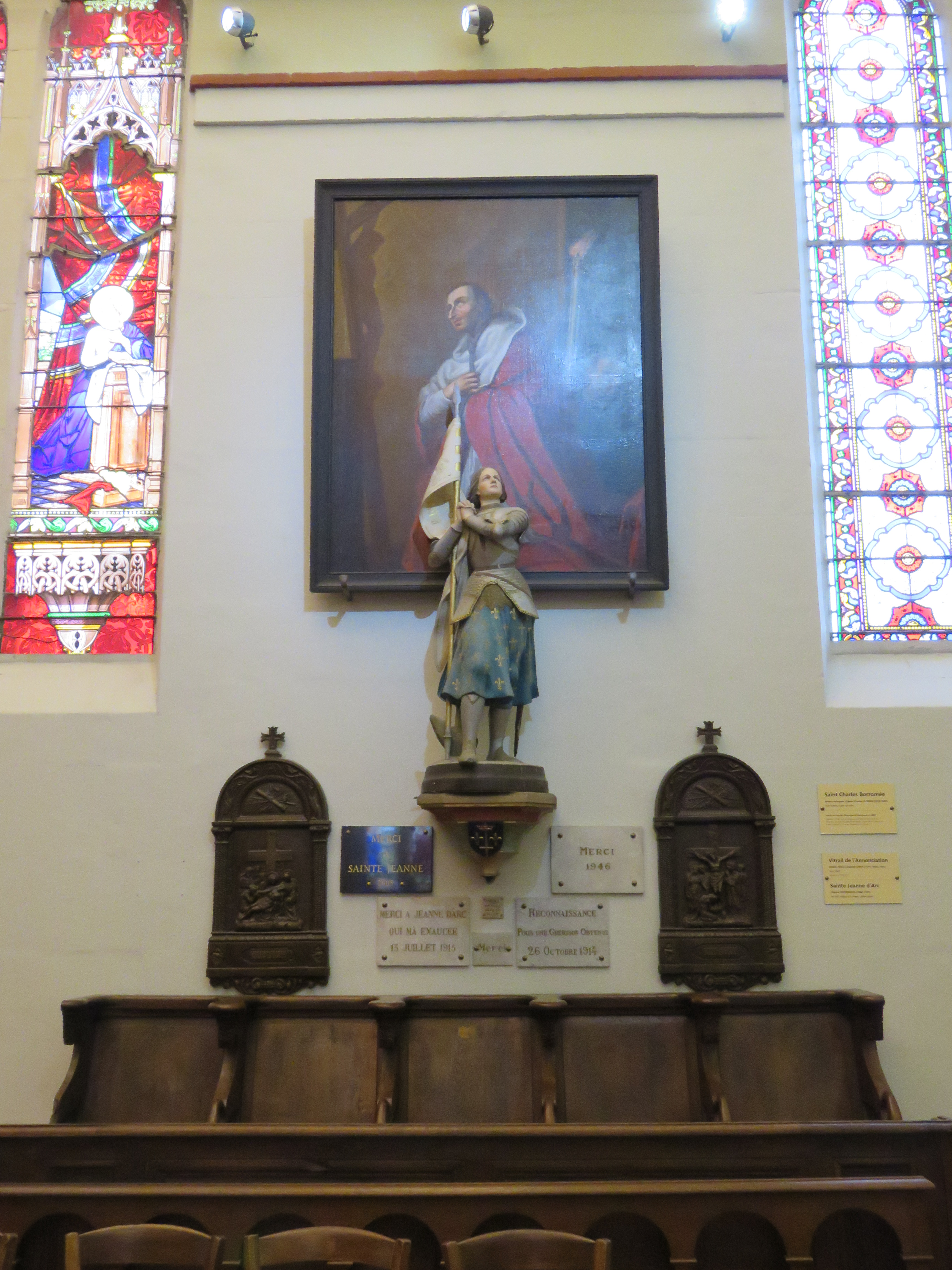 Intérieur de l'église Saint-Antoine - Statue de Jeanne d'Arc